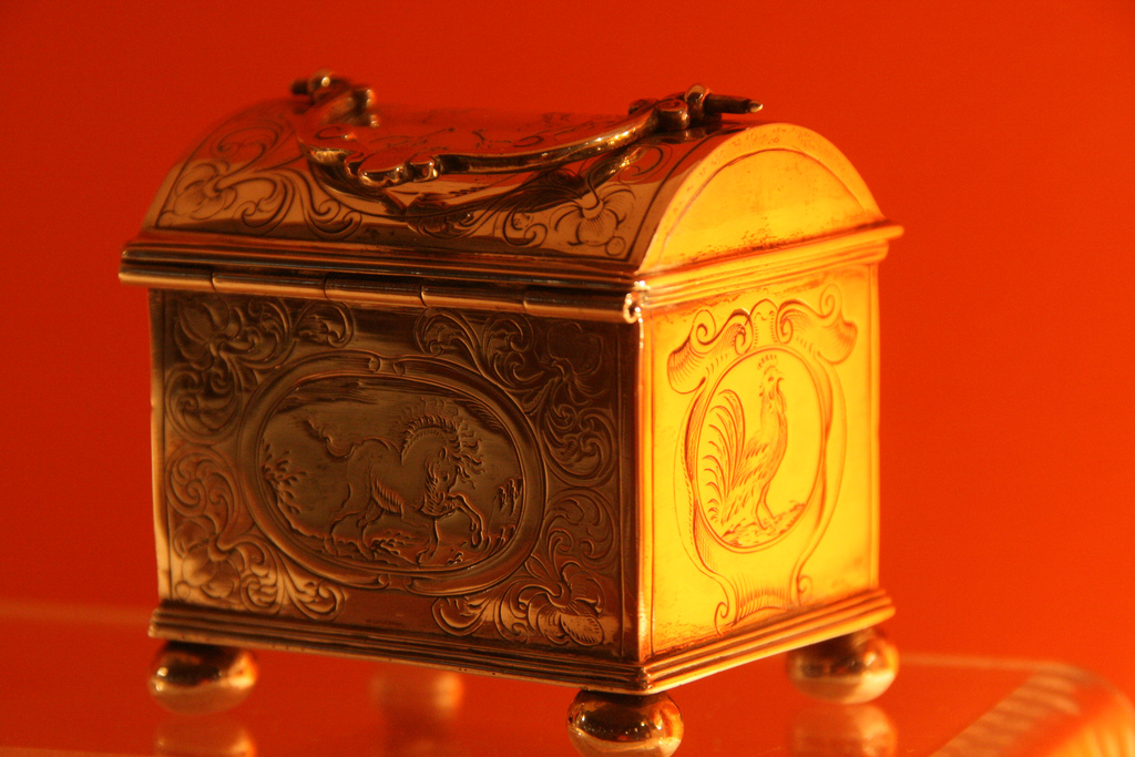 Zilveren knottenkistje met afbeeldingen van personen in 17e eeuwse klederdracht (9×8x5 cm), F. Snip in Dokkum, 1700 (9×8x5 cm), F. Snip in Dokkum, 1700